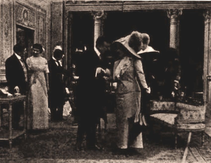 Кадр из фильма "Уходящие из жизни" ("Lo scomparso")